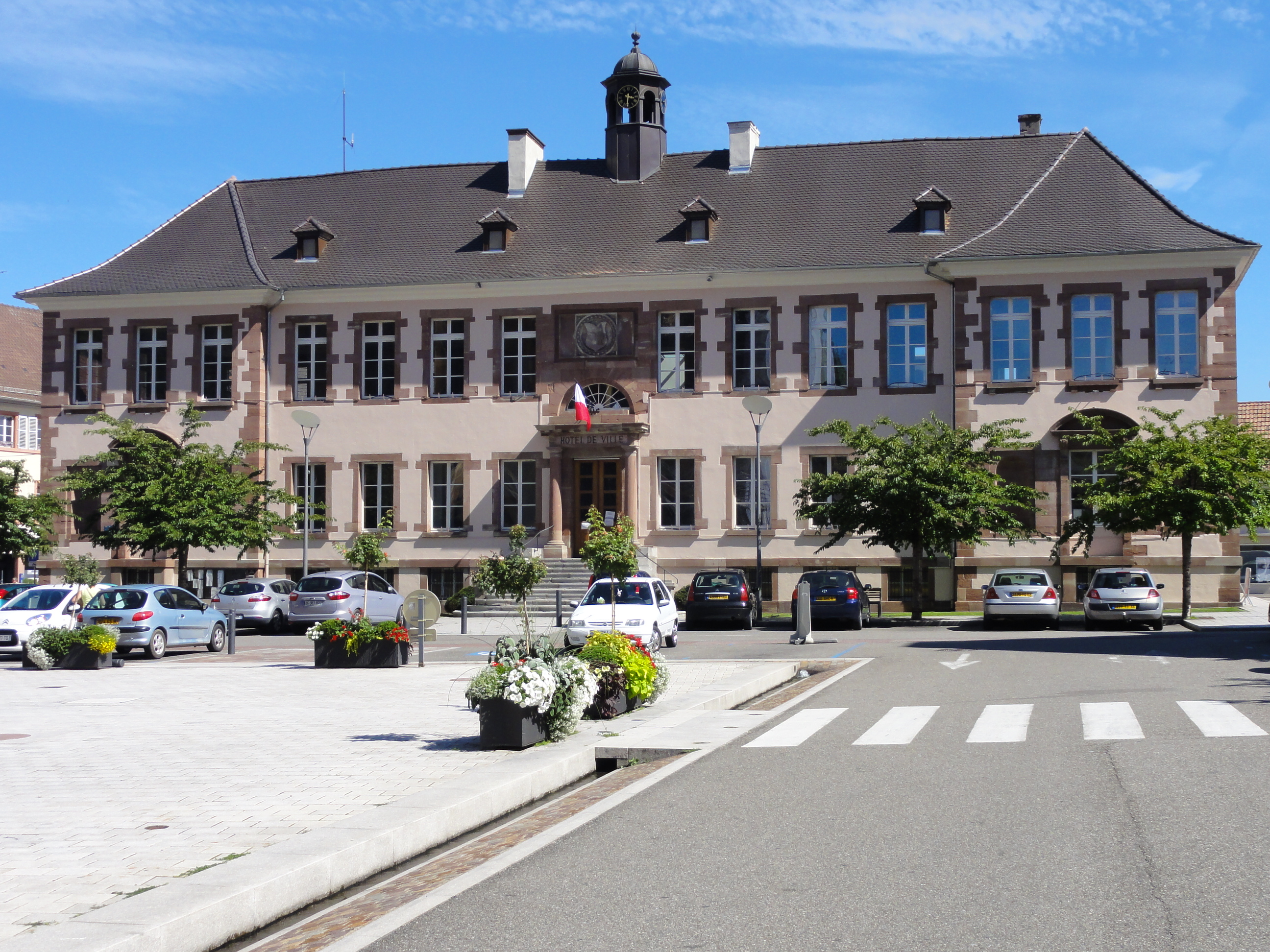 Alsace, Haut-Rhin, Thann, Hôtel de Ville (XVIIIe, Jean-Baptiste Kléber). .